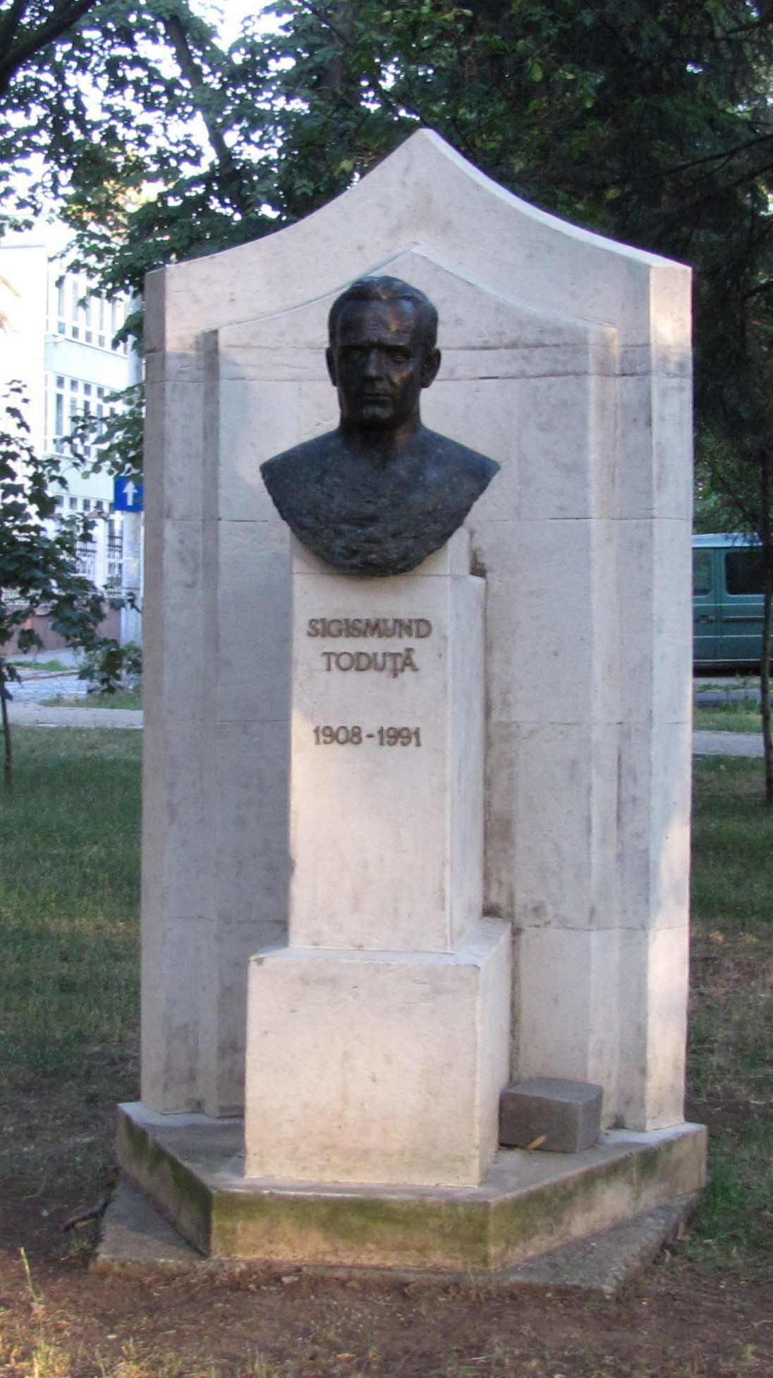 Cluj-Napoca - Parcul Simion-Barnuțiu - Bustul.Sigismund Toduța